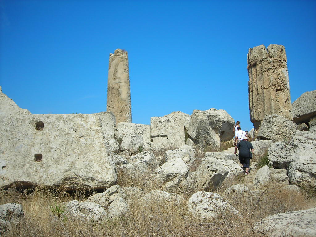 Selinunte